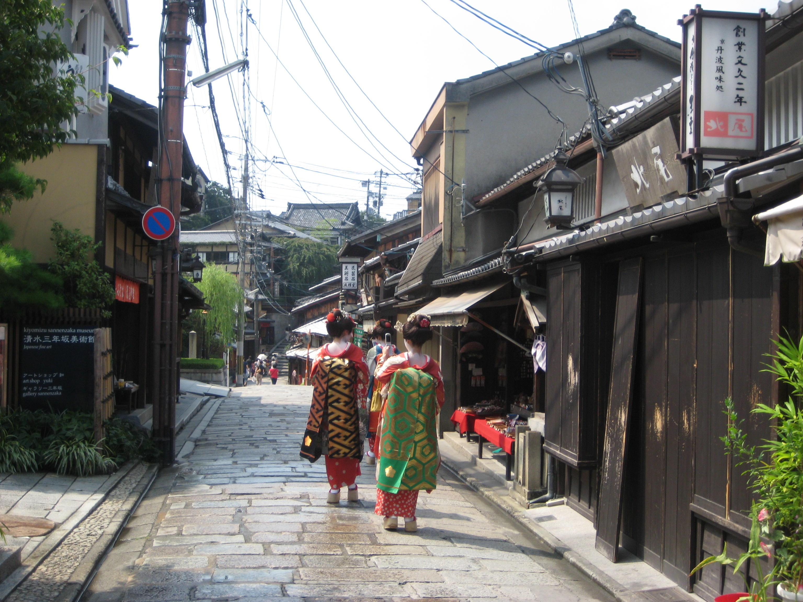 Tair Geisha yn mynd am dro ben bore yn ardal Higashiyama, Kyoto.